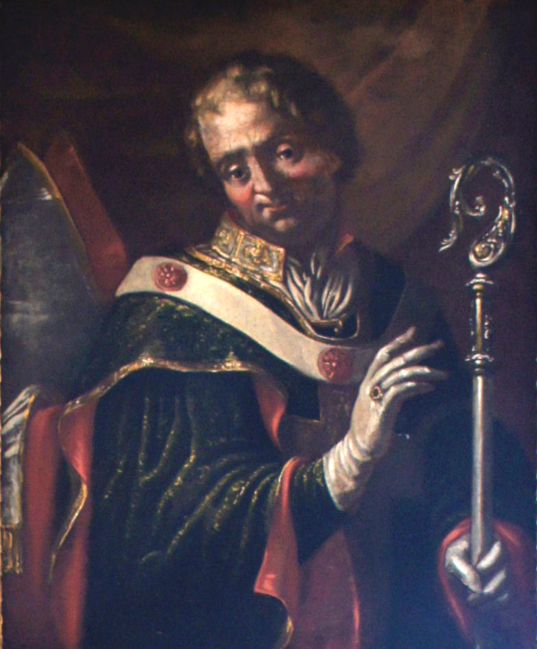 Porträtgemälde von Moritz von Sandizell, Fürstbischof von Freising, im Fürstengang zwischen Fürstbischöflicher Residenz und Freisinger Dom.